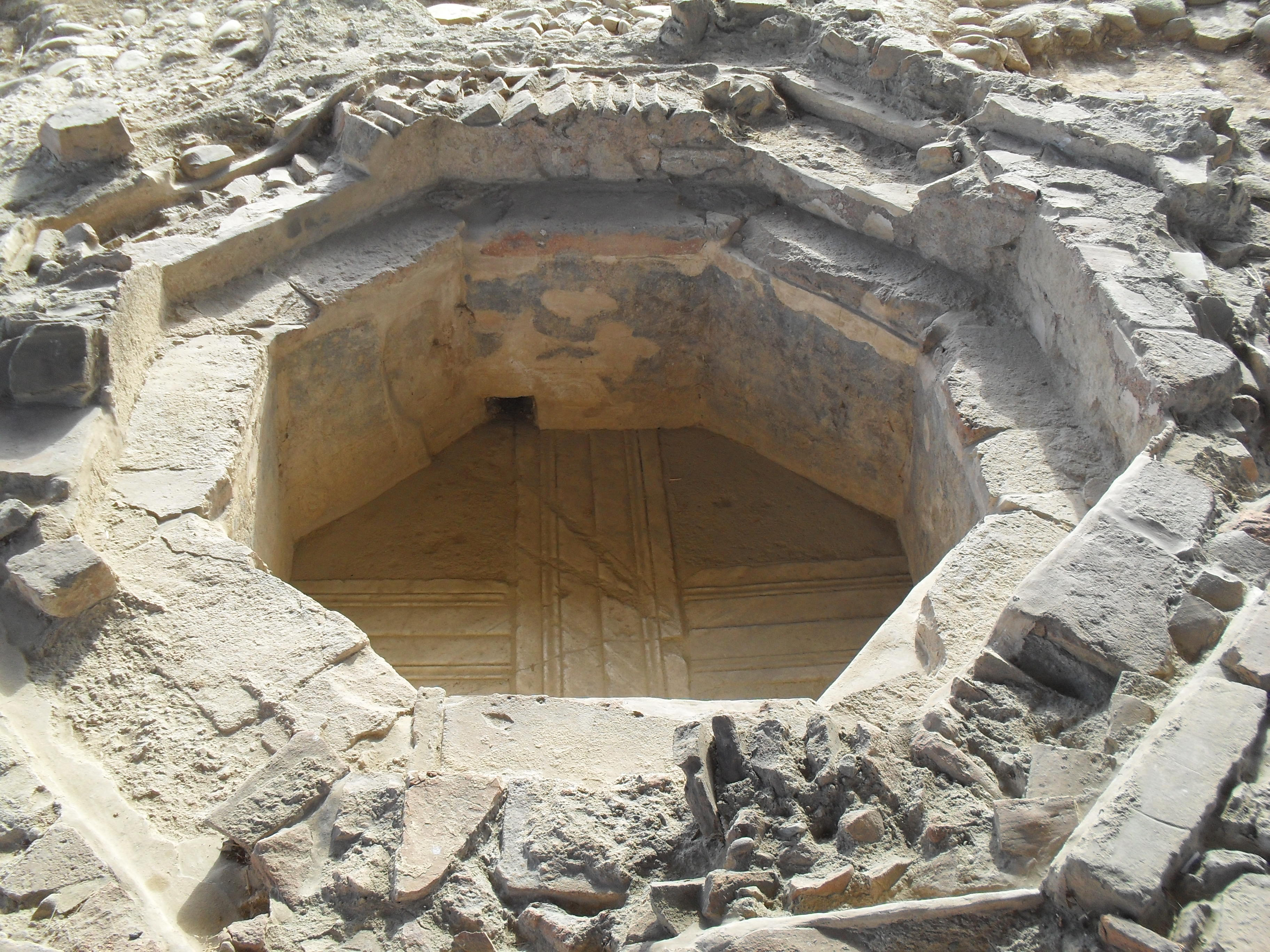 Fonte battesimale a sezione ottagonale all'interno dell'area archeologica di Costa Balenae - Riva Ligure (IM)